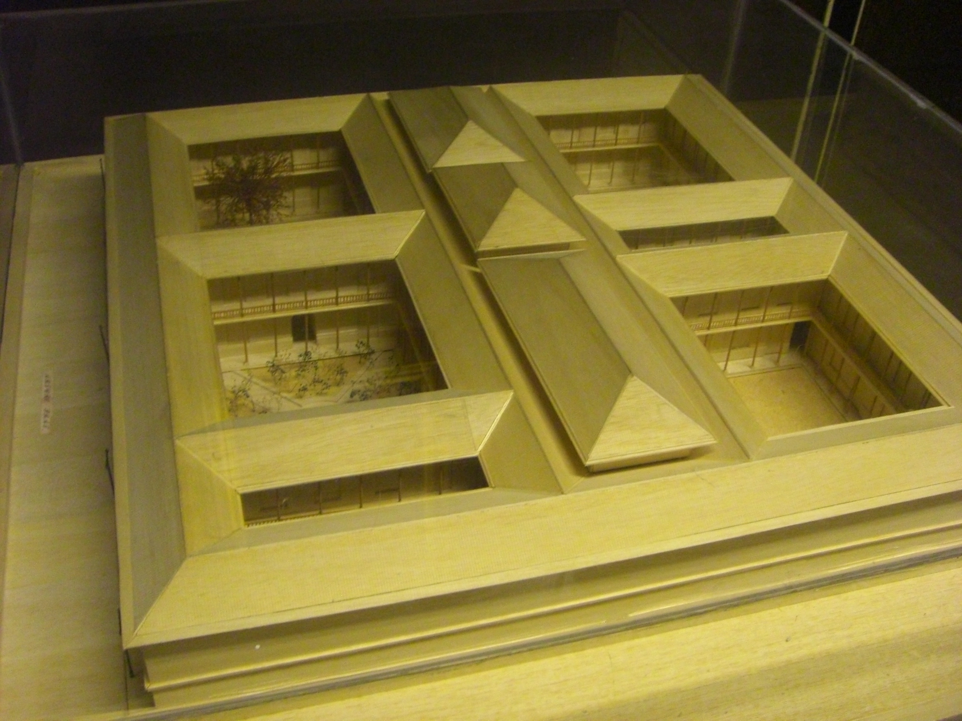 Maqueta del antiguo edificio que albergó al Instituto Nacional, demolido a partir de 1963. Se encuentra en el pasillo "de los Presidentes" -llamado así por la galería de retratos de exalumnos destacados- del actual edificio del Instituto Nacional.